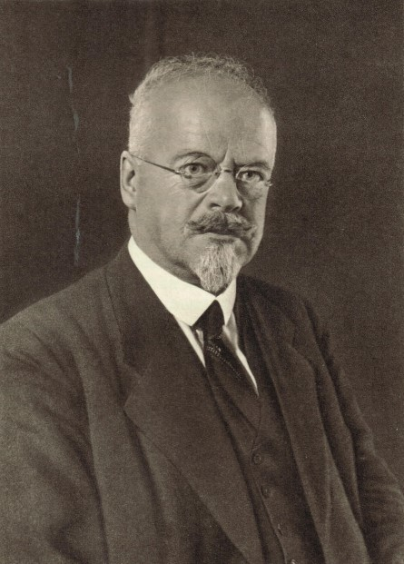 Scan Paulgerhard (22.11.2019)